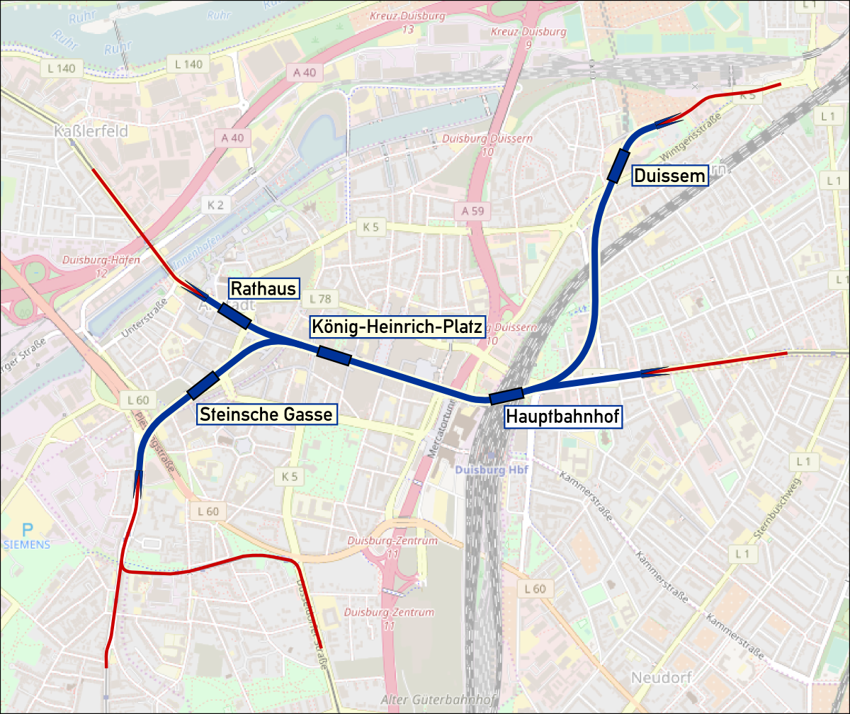 Duisburg, Karte des Innenstadttunnels der Stadtbahn bei der Einweihung am 11. Juli 1992. This map may be incomplete, and may contain errors. Don't rely solely on it for navigation.